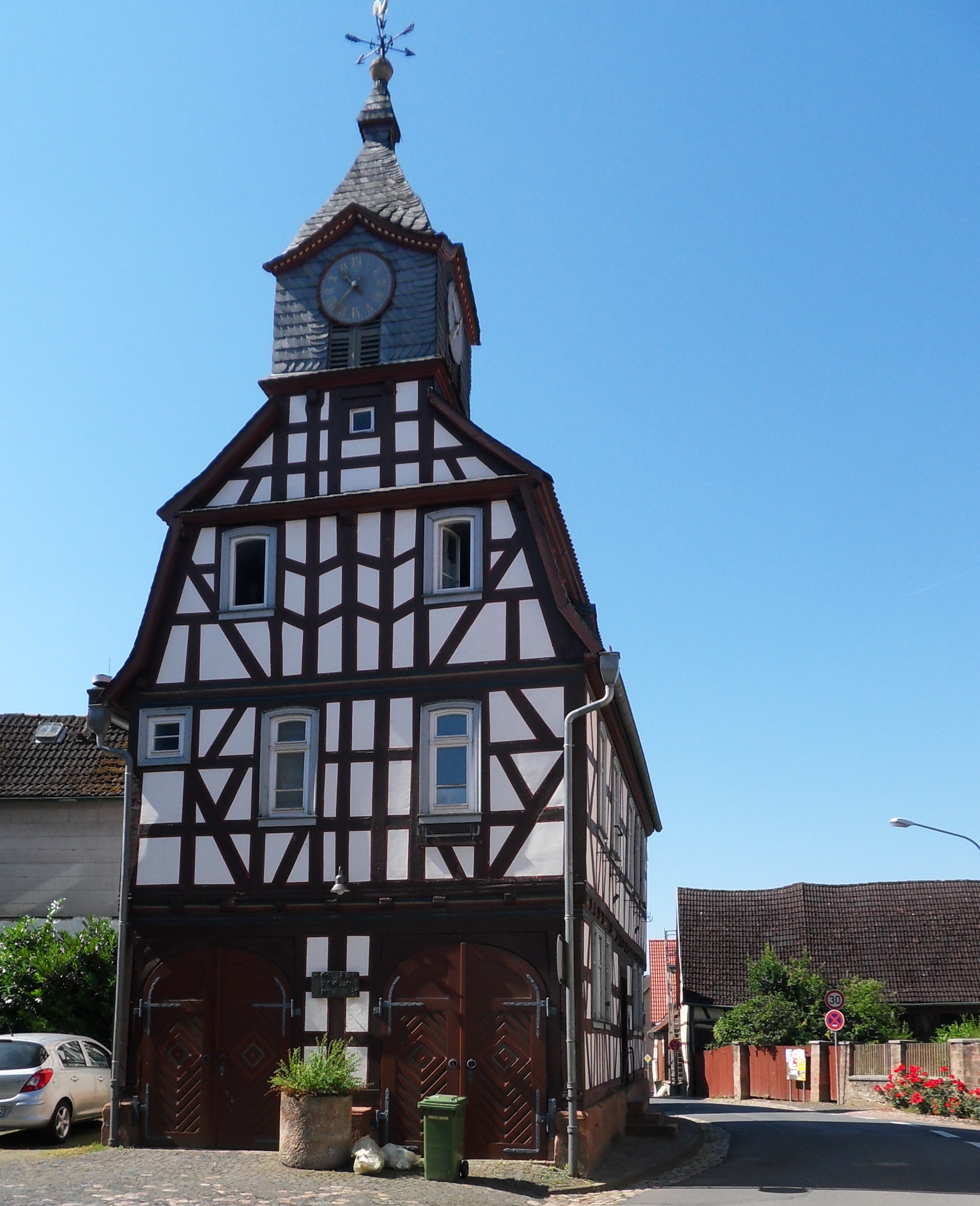 Altes Rathaus in der Lengfelder Straße 25 in Nieder-Klingen